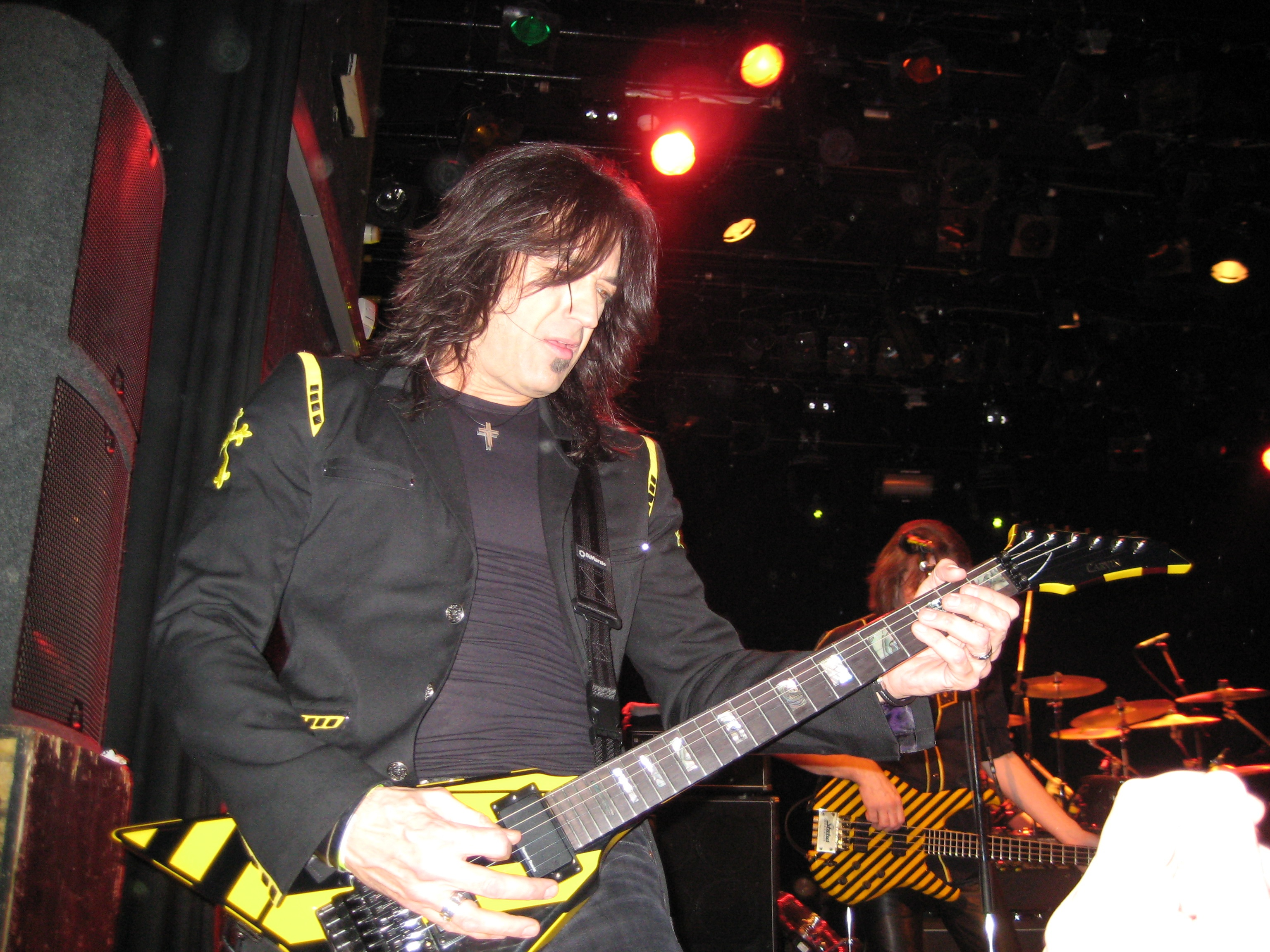 Optreden Tivoli Utrecht